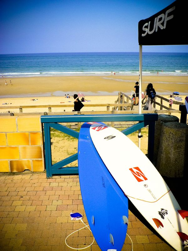 Lacanau Ocean (France - 33)